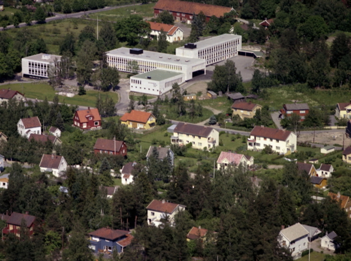 Munkerud med Munkerud skole og Munkerud gård i bakgrunnen